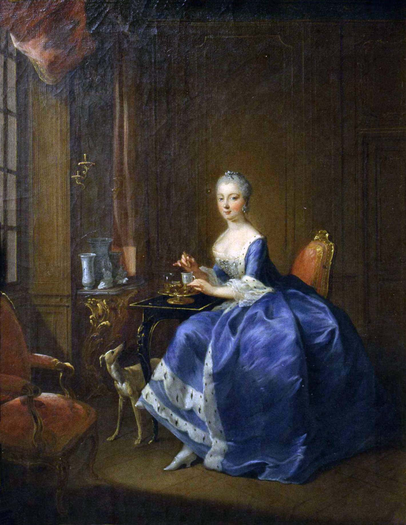 Wilhelmine Landgräfin von Hessen-Kassel, Gemahlin des Prinzen Heinrich von Preußen.